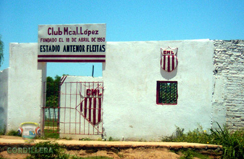 Club Deportivo en Isla Pucú